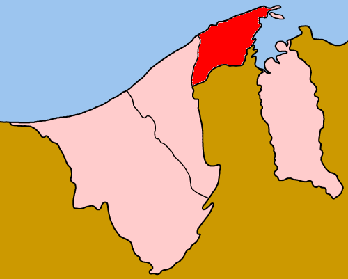 Dystrykty_Brunei_Brunei_i_Muara